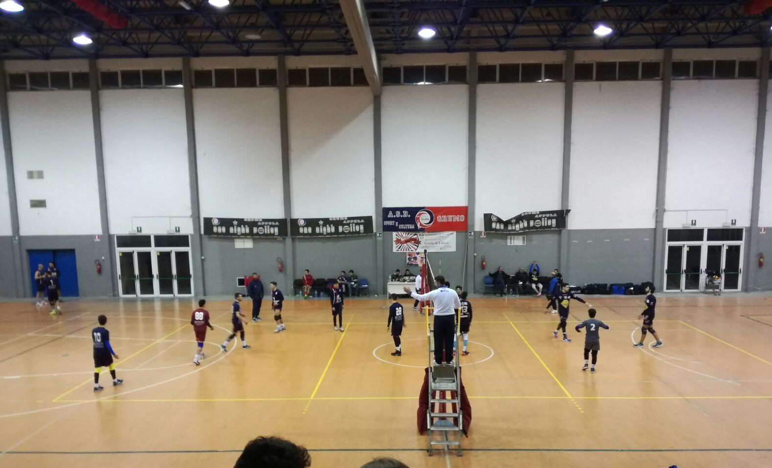 Palazzetto dello sport di Grumo Appula che ospita le partite di pallavolo della squadra locale.